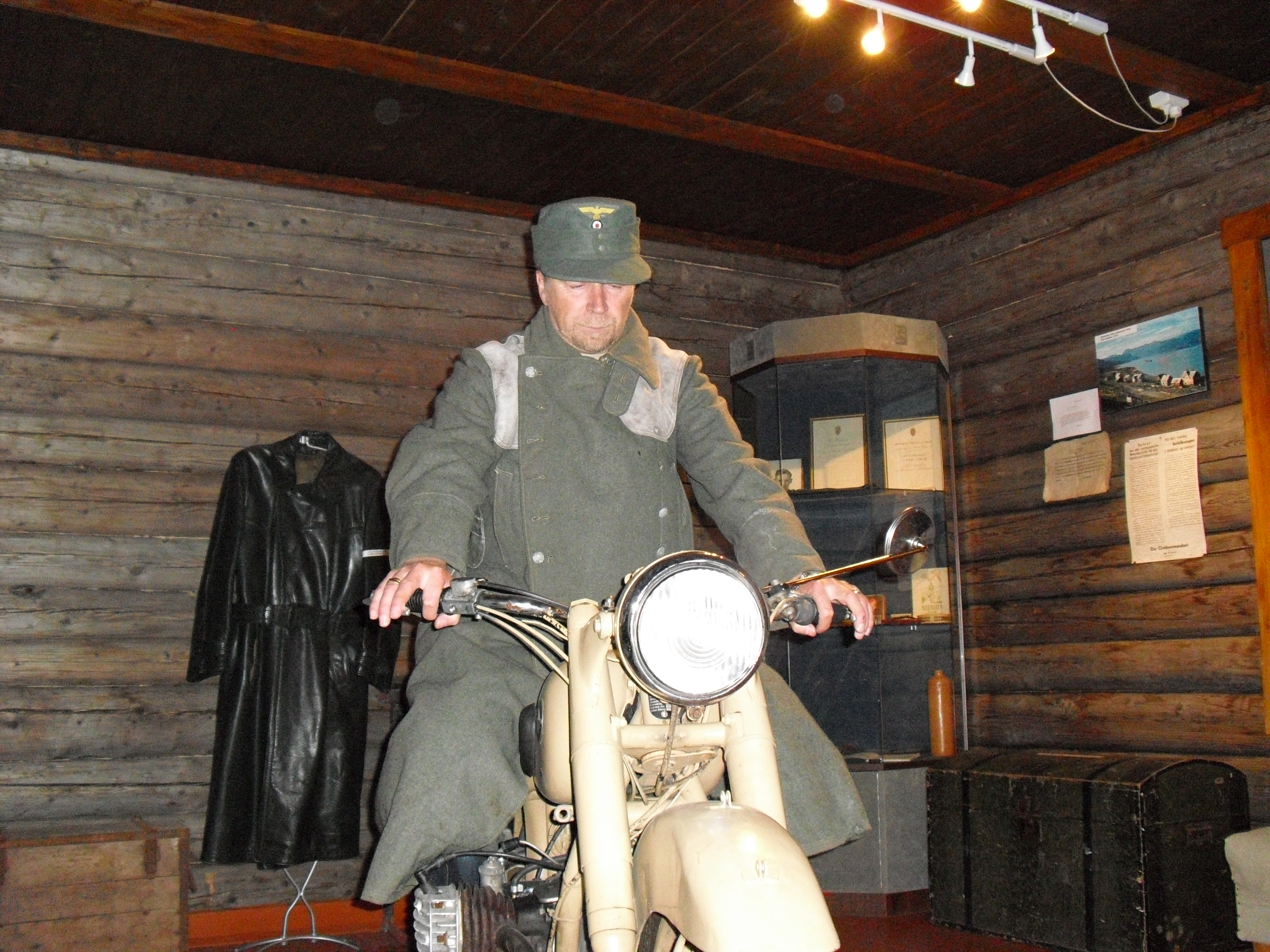 Fra samlingene i Tirpitz museet i Alta